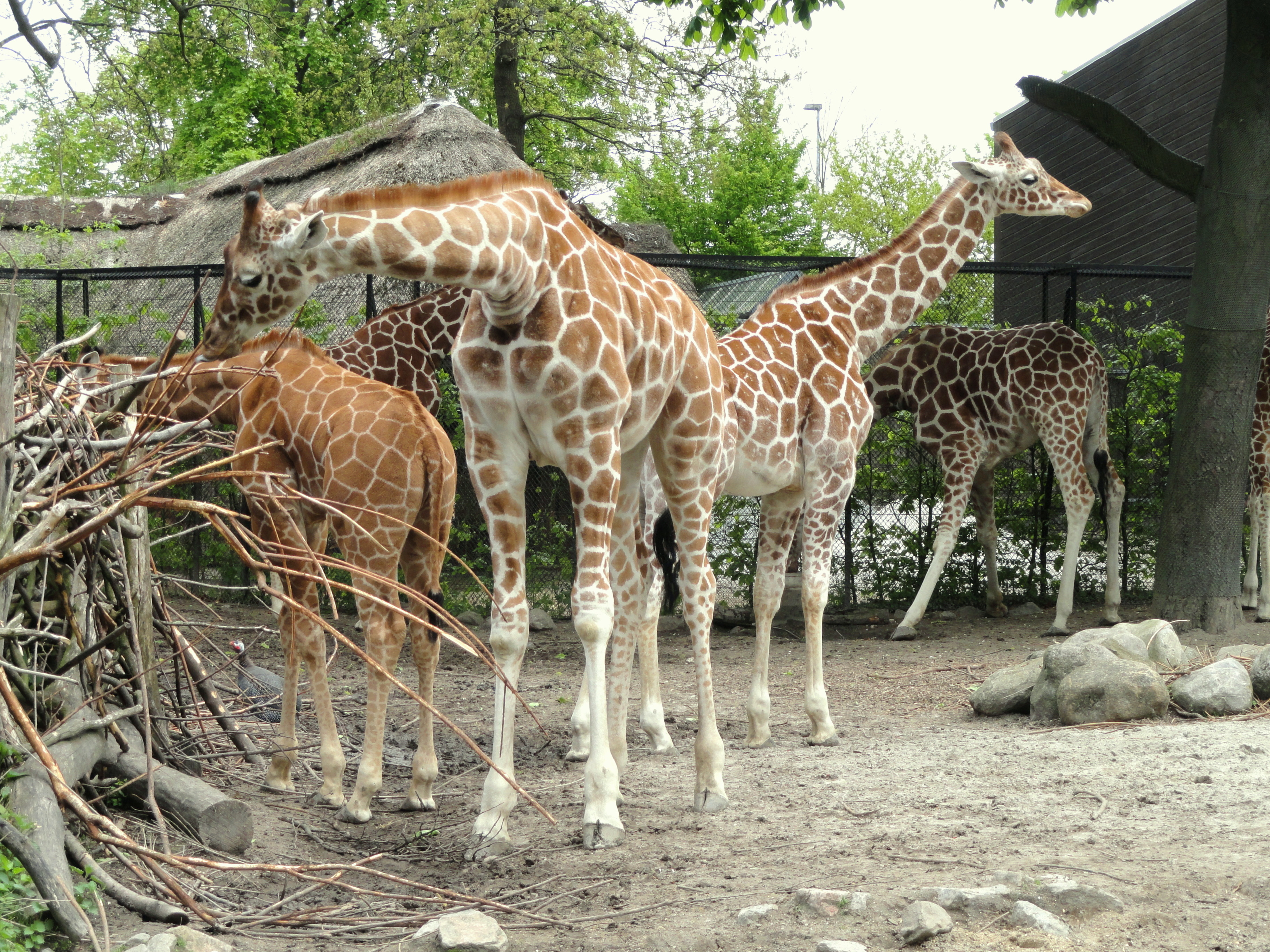 Copenhagen Zoo, Frederiksberg, Copenhagen, Denmark.